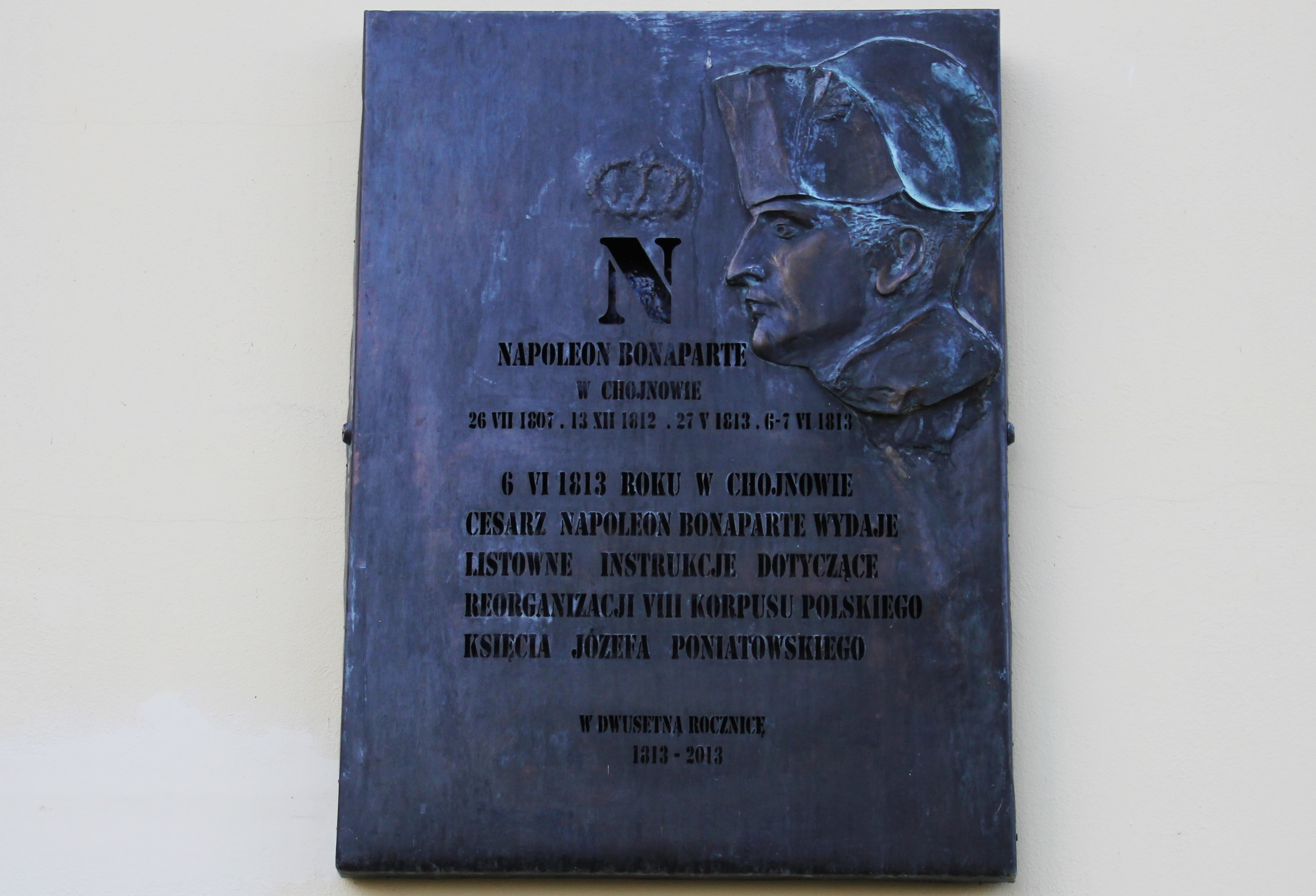 Tablica upamiętniająca wydanie przez cesarza Napoleona Bonaparte listownych instrukcji dotyczących reorganizacji VII Korpusu Polskiego księcia Józefa Poniatowskiego, umieszczona na ścianie Zamku Piastowskiego w Chojnowie.